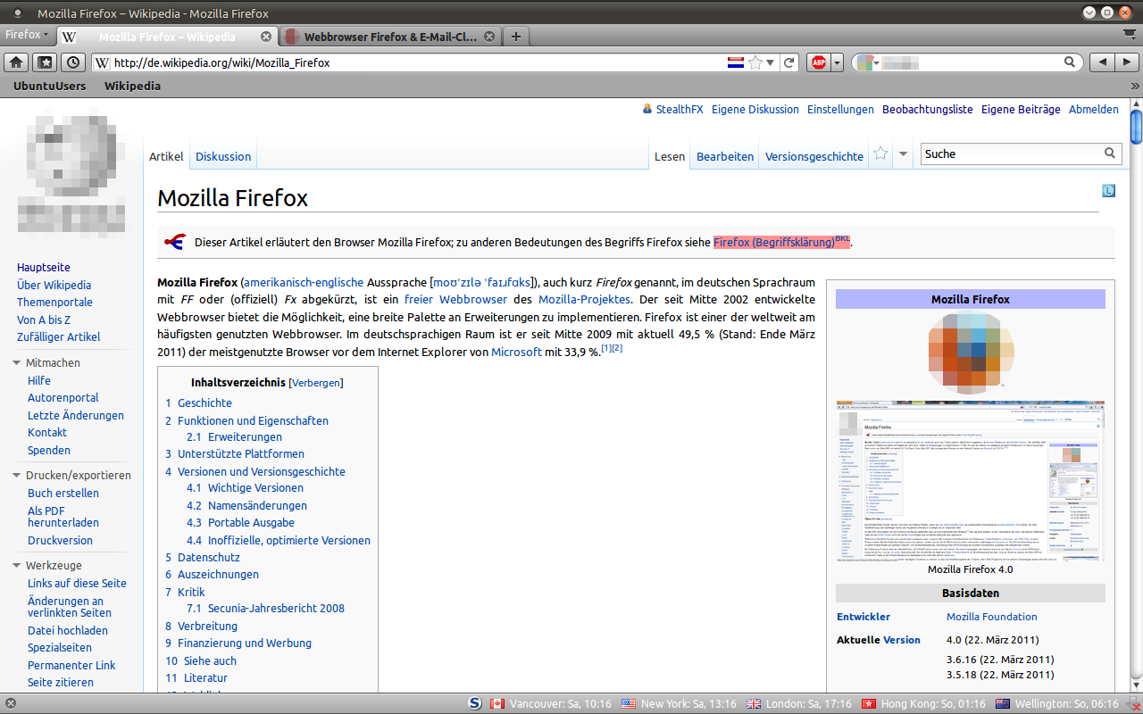 Bildschirmfoto Firefox Version 4.0 mit alternativem Theme und diversen Add-ons, Template:OS